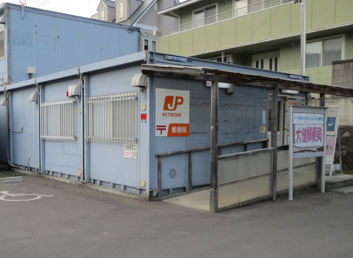 東日本大震災後の2011年10月、迫又地区に移転されたプレハブの郵便局